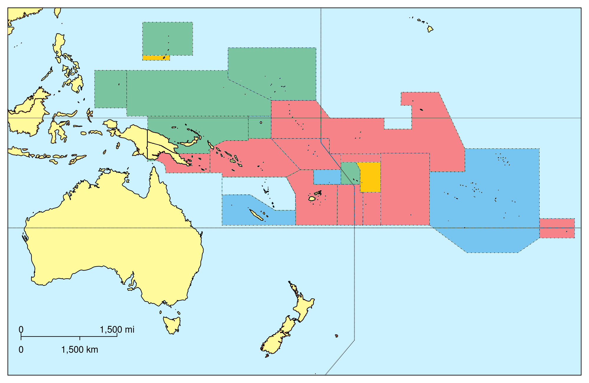 Carte coloniale de l'Oceanie 1914